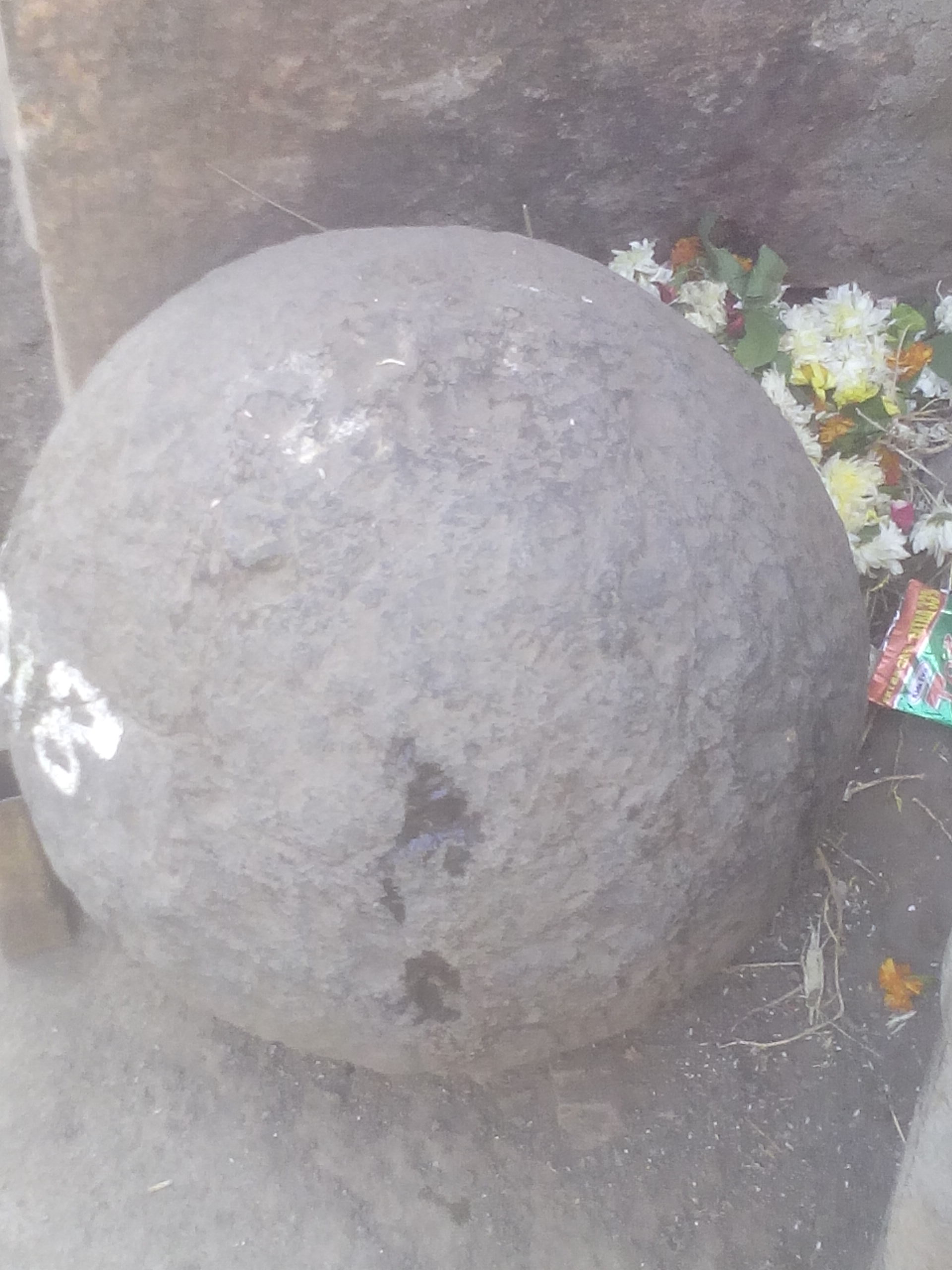 या गोलाकार दगडावरतीच राम बसले होते.